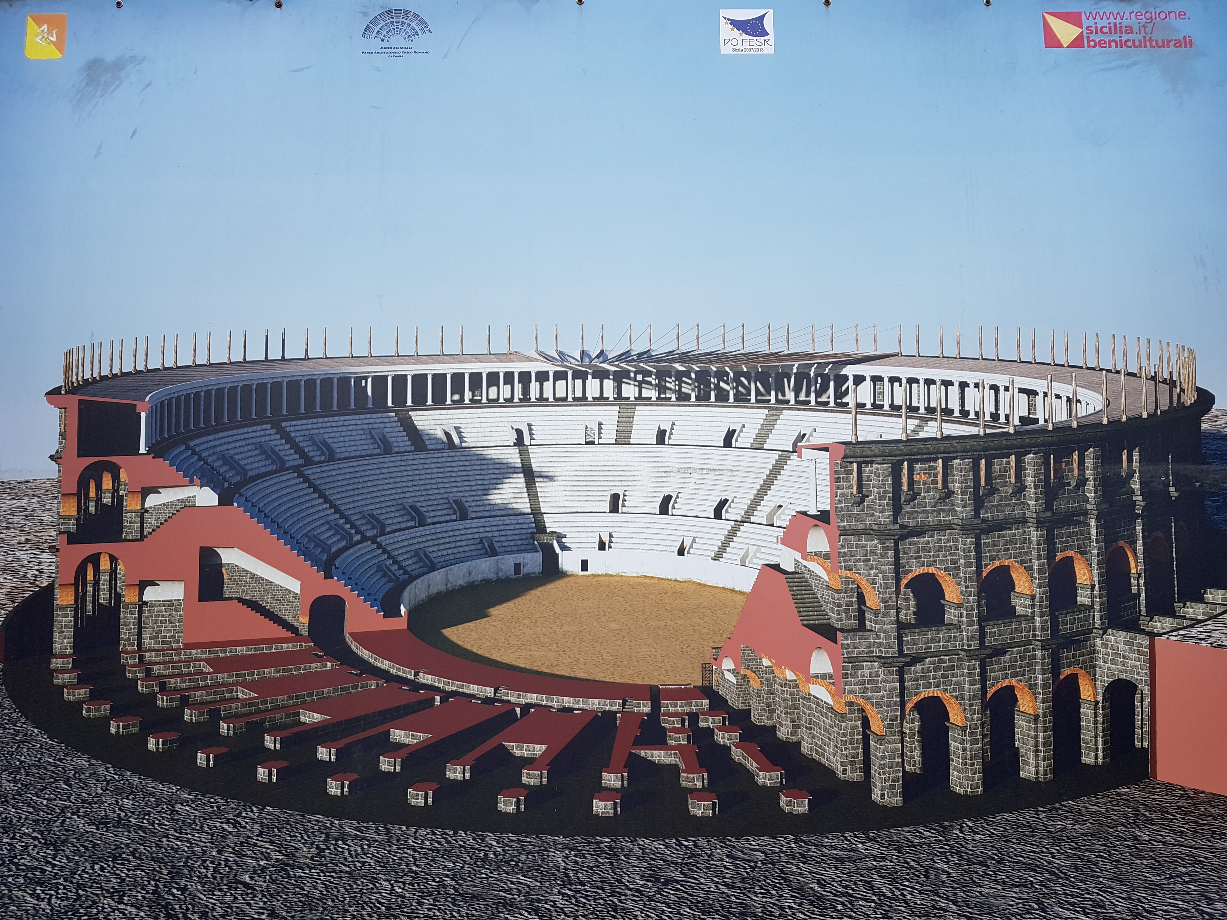 Ricostruzione digitale e sezione dell'Anfiteatro Romano di Catania